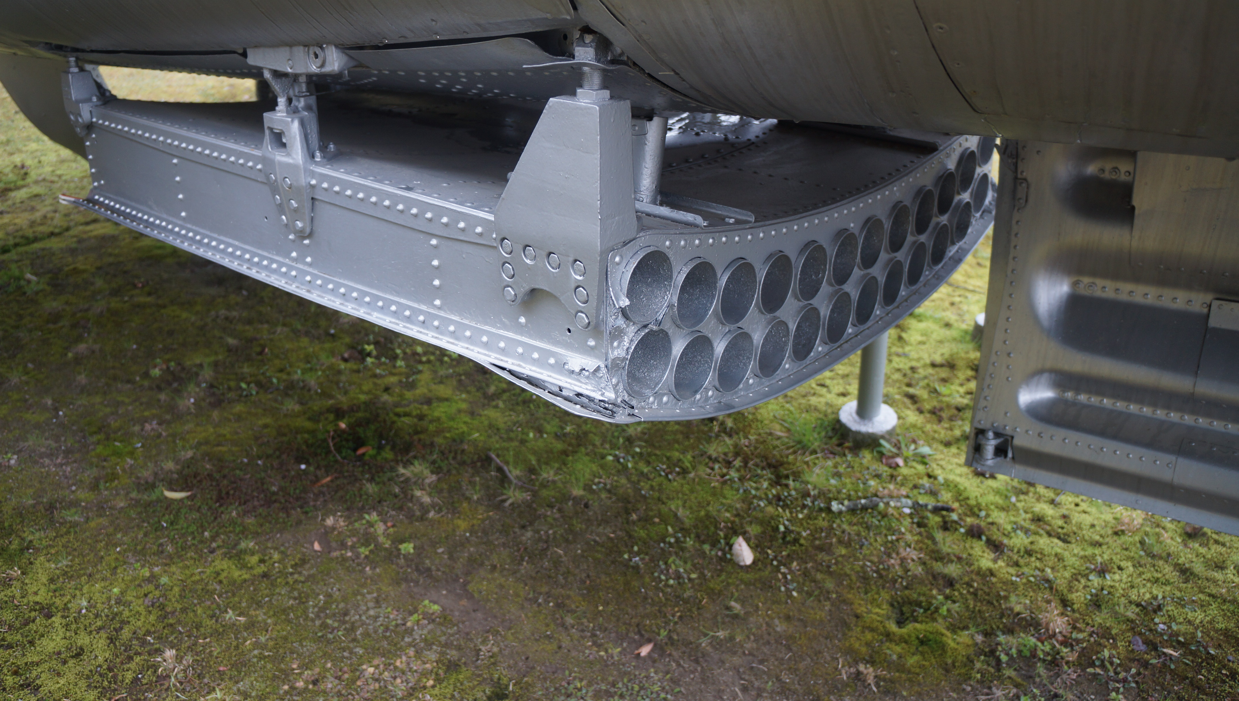 F-86D背面の2.75インチFFAR（マイティマウス）用ロケットランチャー。 13年4月6日 航空自衛隊奈良基地にて。